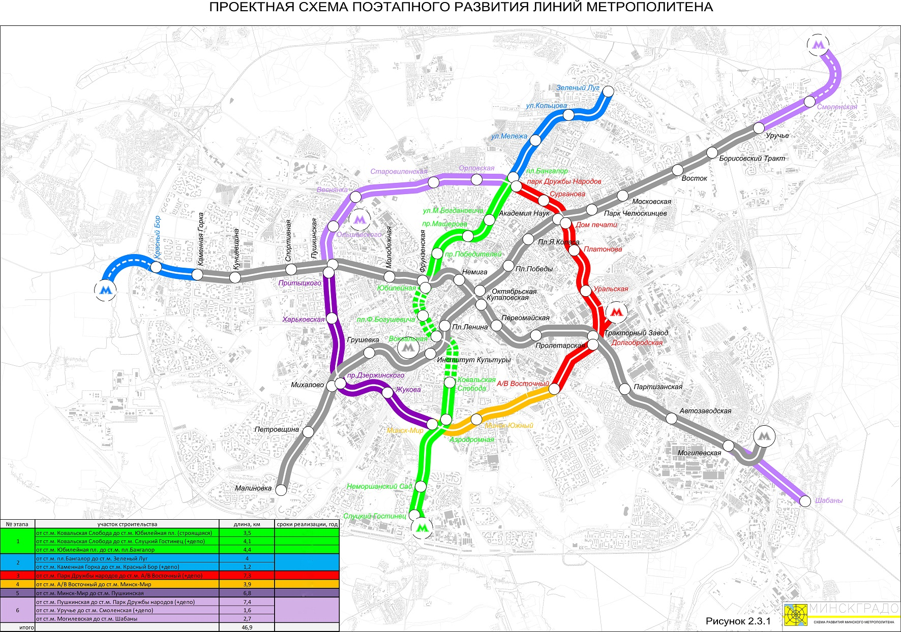 Схема чатырох ліній Мінскага метрапалітэна